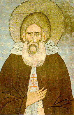 Serge de Radonège Сергий Радонежский. Покров. 20-е годы XV в.